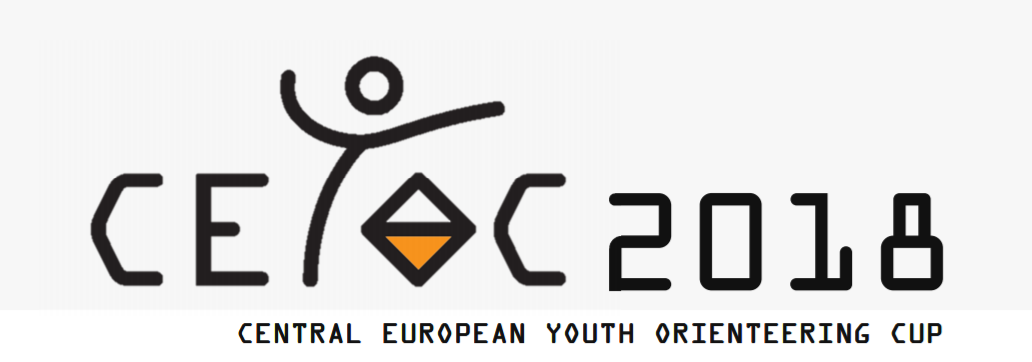 Official logo of CEYOC 2018, Csákvár, Hungary.